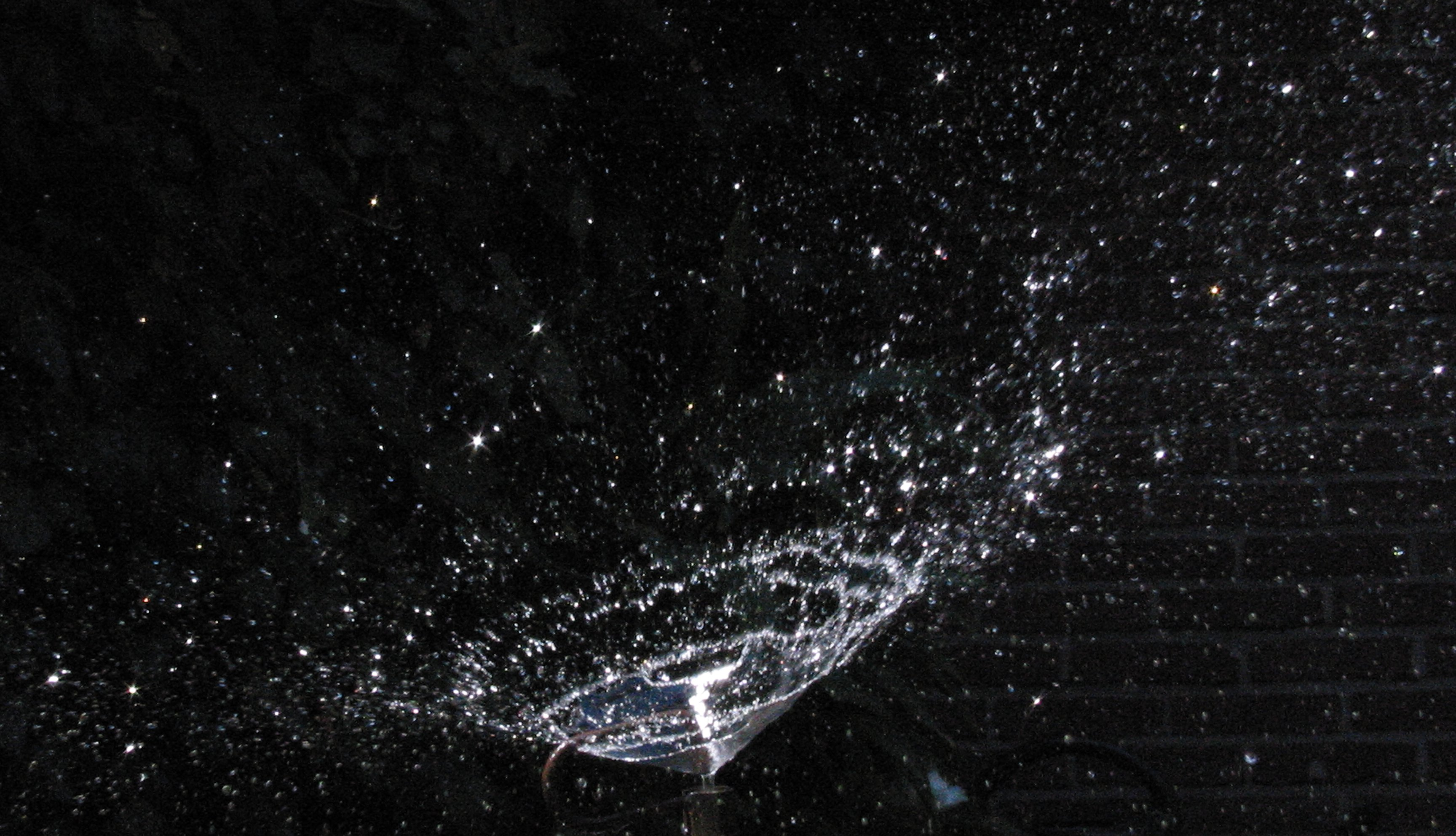 (waterdruppels bij beregening) sprinkler waterdrops